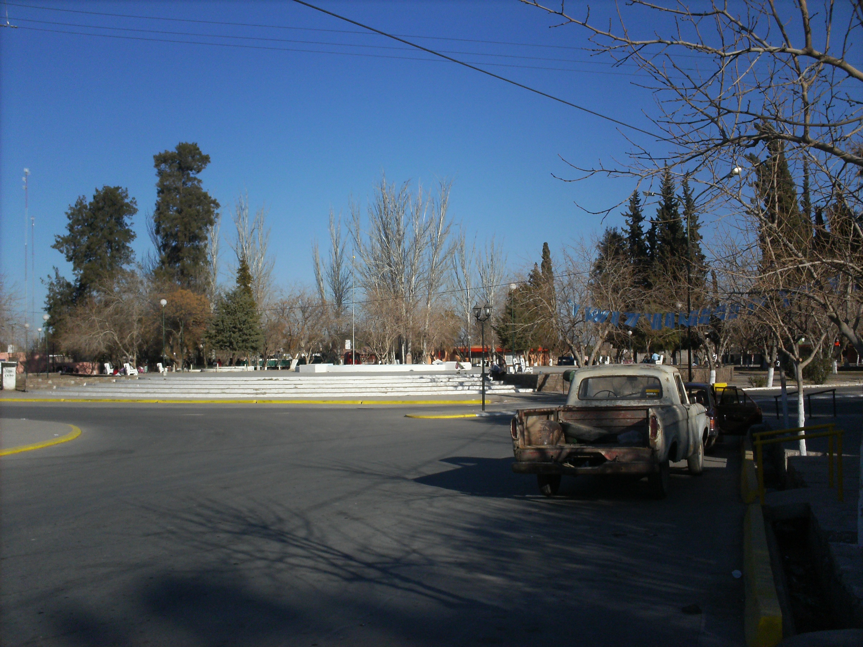 la plaza principal de la villa